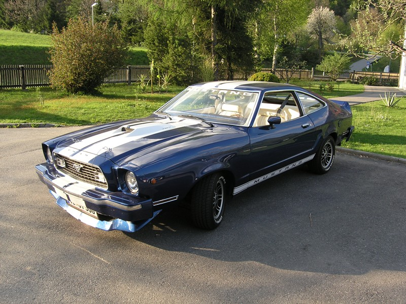 Mustang 74 Front